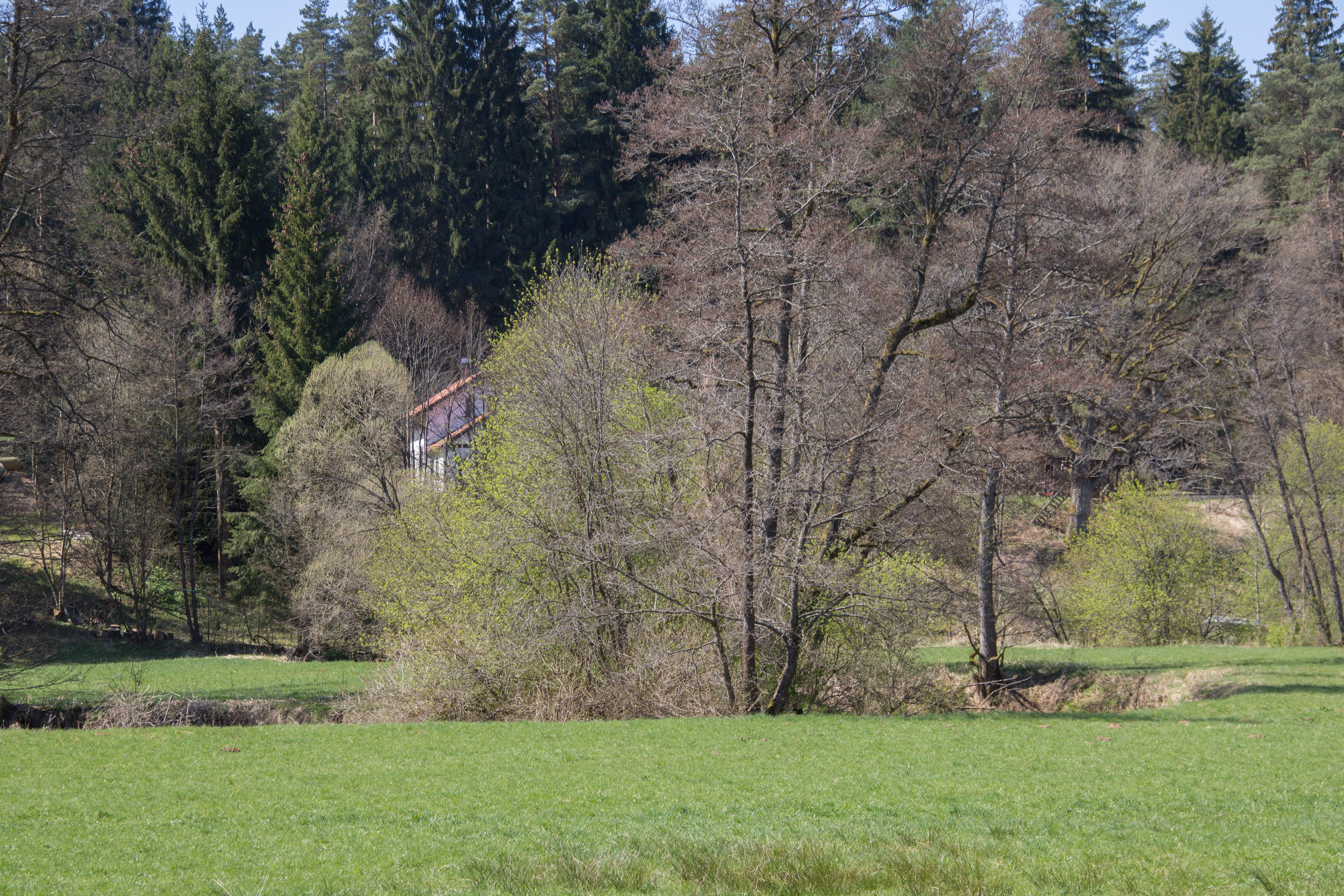 NSG Pegnitzau zwischen Ranna und Michelfeld